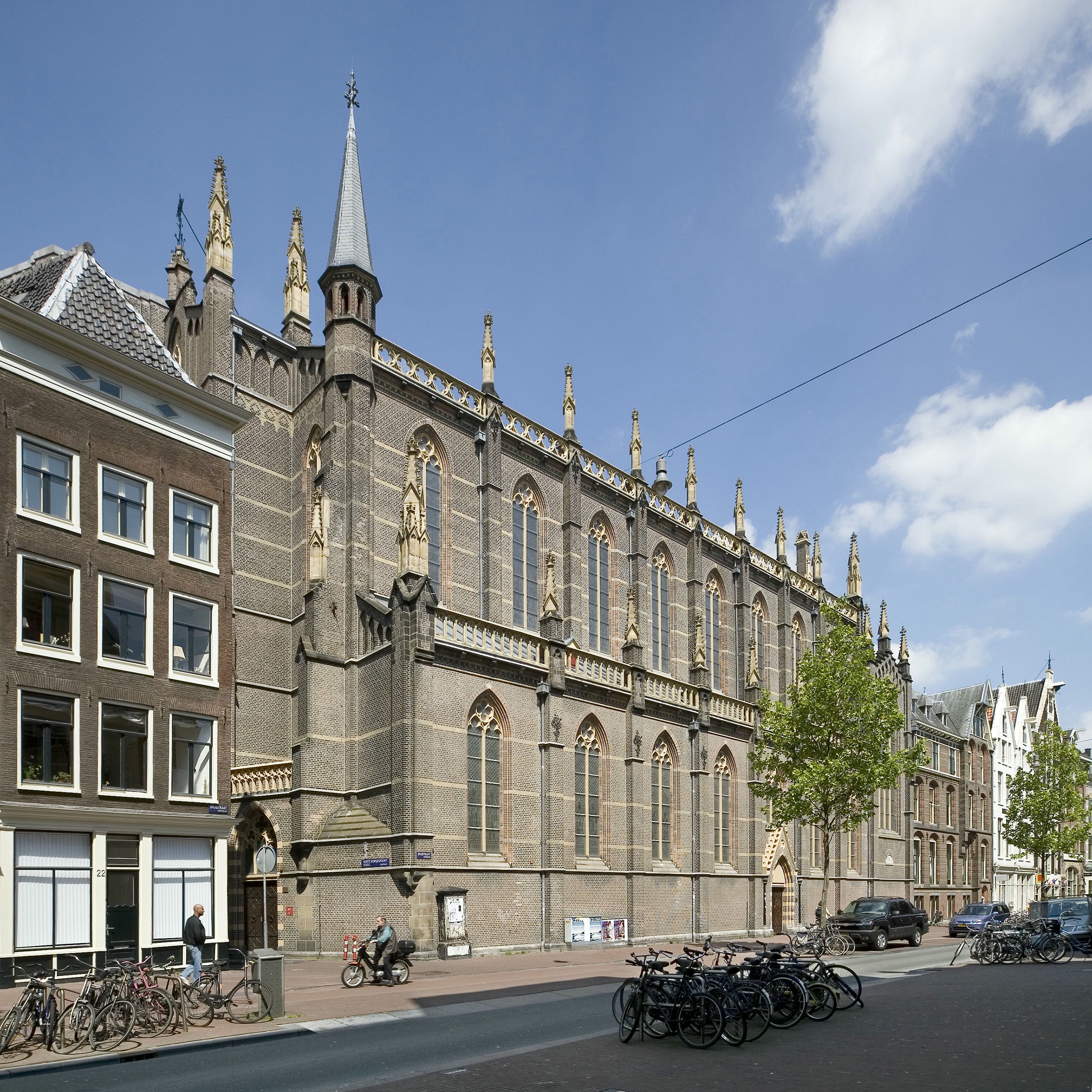 Rooms-katholieke Sint-Dominicus Kerk: Overzicht van de zuidgevel in de spuistraat (opmerking: Gefotografeerd voor de publicatie van het boek Pierre Cuypers, architect van 1827 tot 1921)